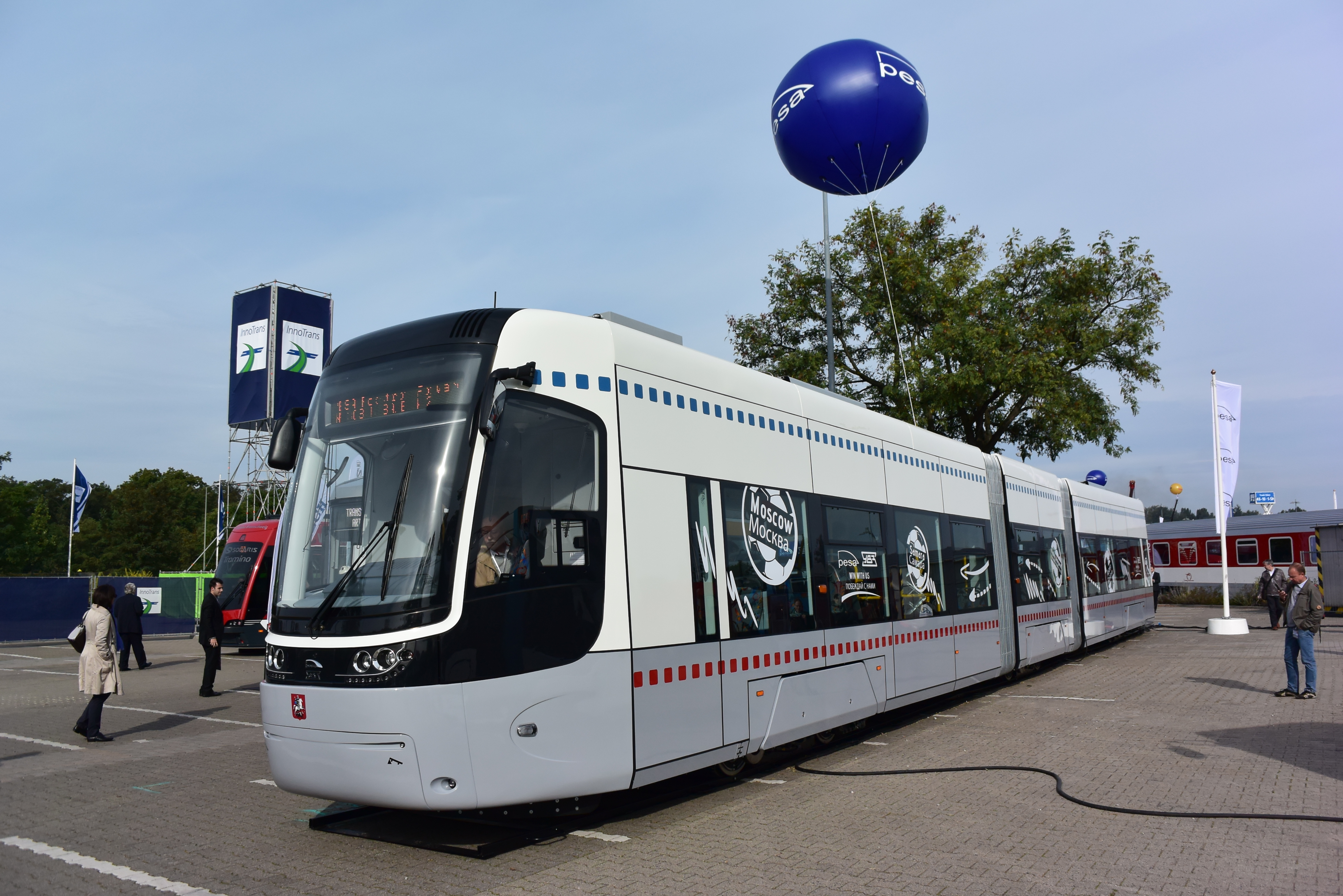 PESA Fokstrot podczas InnoTrans 2014